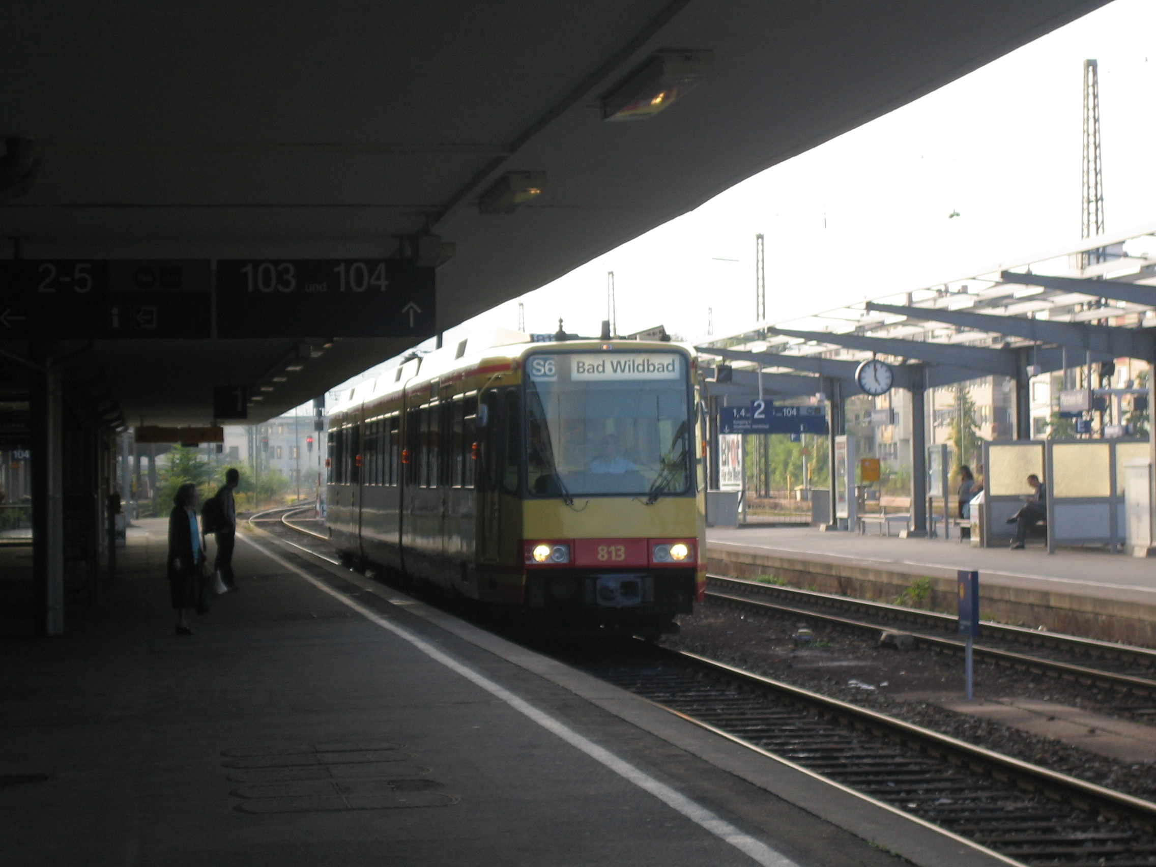 Stadtbahn im Hbf. von Pforzheim